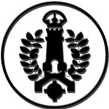 escudo